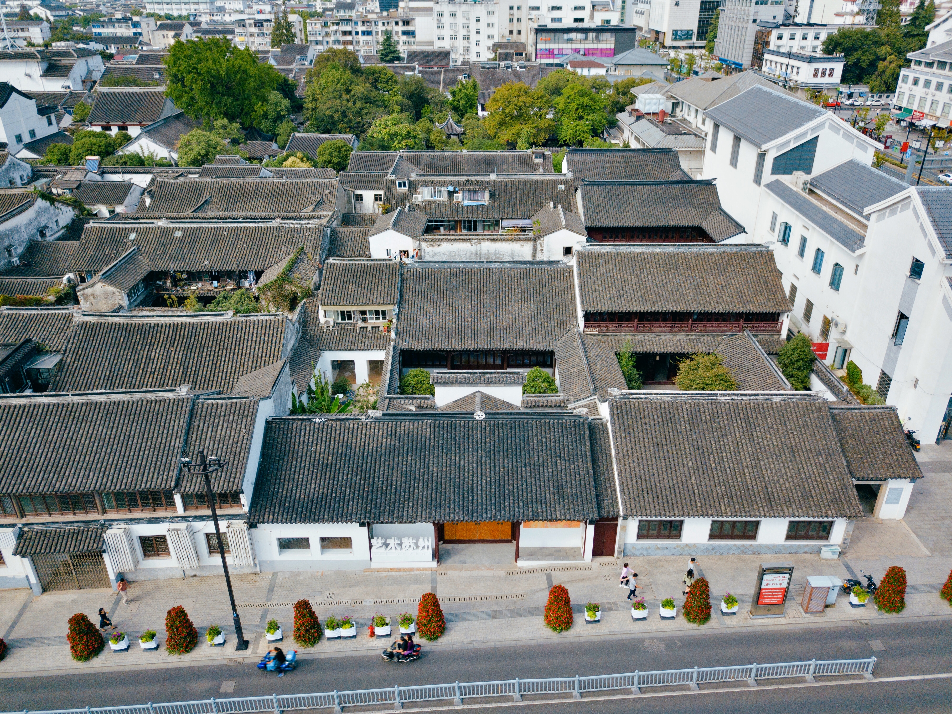 中文（中国大陆）: 过云楼·苏州干将西路·全景